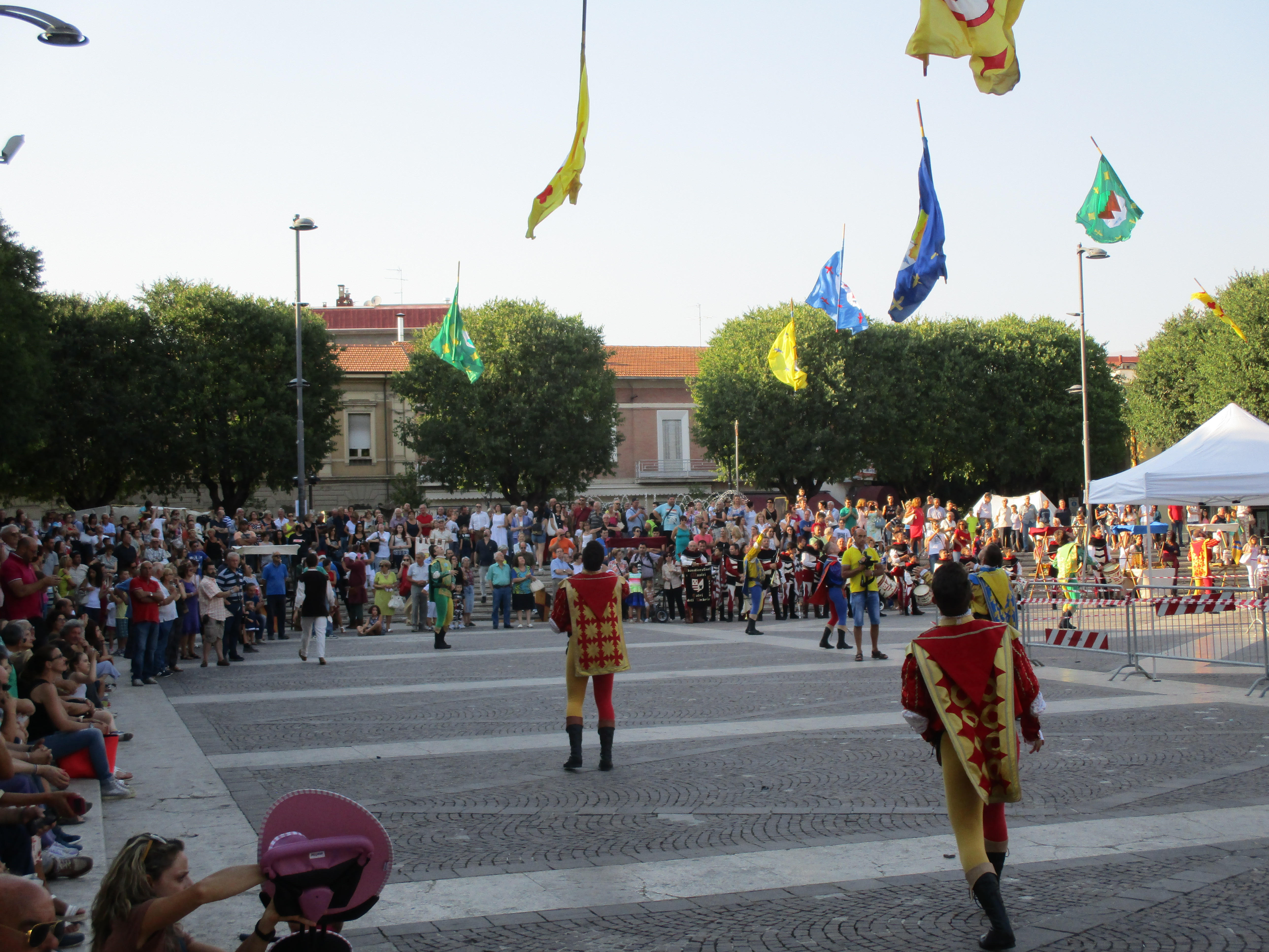 Sbandieratori ad Avezzano